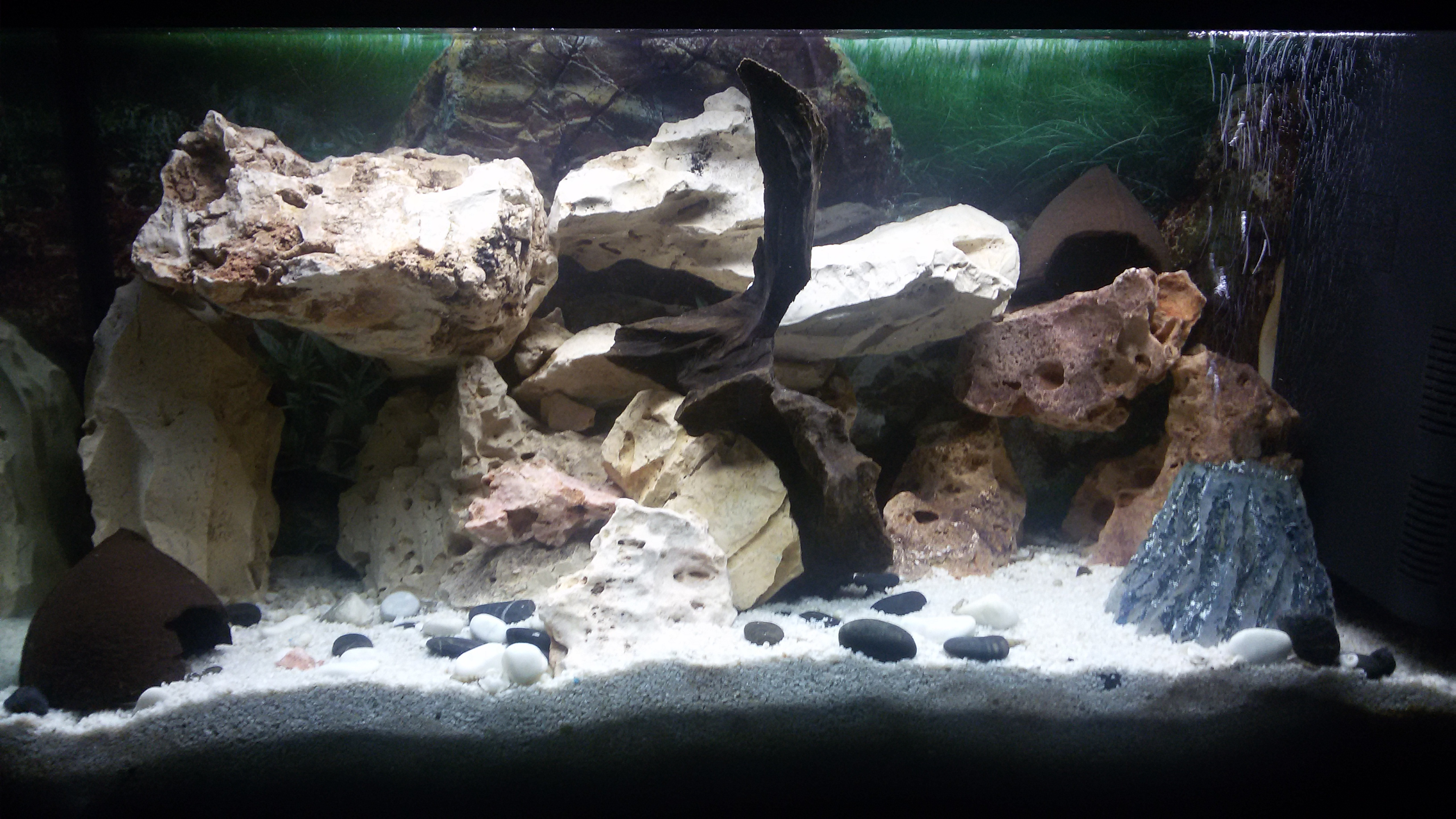 Acquario